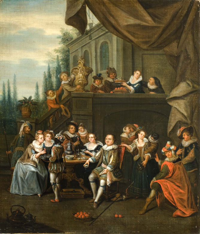 Elegant company at table on a castle terrace